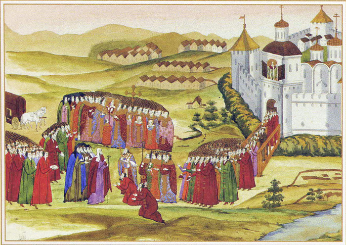 Встреча Филарета Никитича князем Пожарским. 10 июня 1619 года. Почетная первая встреча под Можайском митрополита Ростовского и Ярославского Филарета, отца царя Михаила Федоровича, освобожденного из восьмилетнего польского плена, с архиепископом Рязанским и Муромским Иосифом, духовными лицами, князем Д. М. Пожарским и окольничим князем Г. К. Волконским во время его следования в Москву